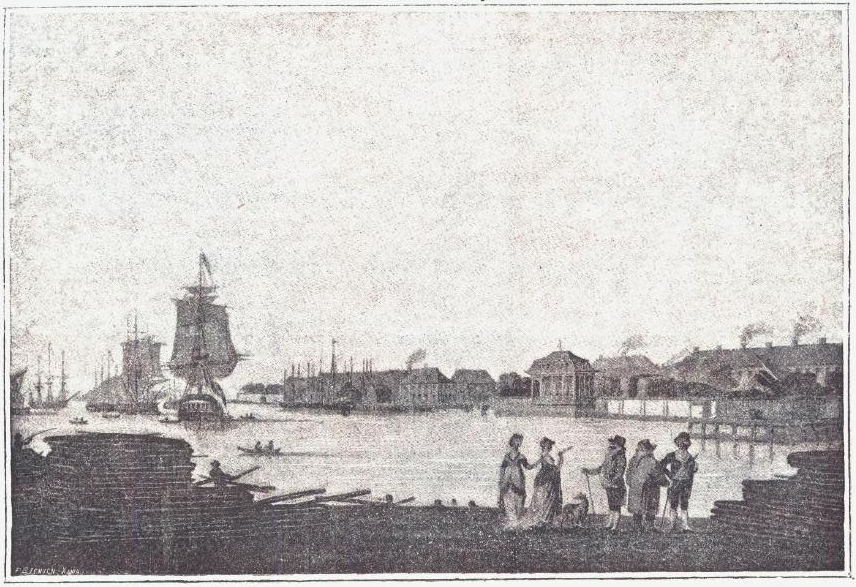 Bernt Ankers Hus (Palæet) med Have og Pavillon. Efter Originalen (en gammel Haandtegning), tilhørende Fru Søegaard, Eidsvold.